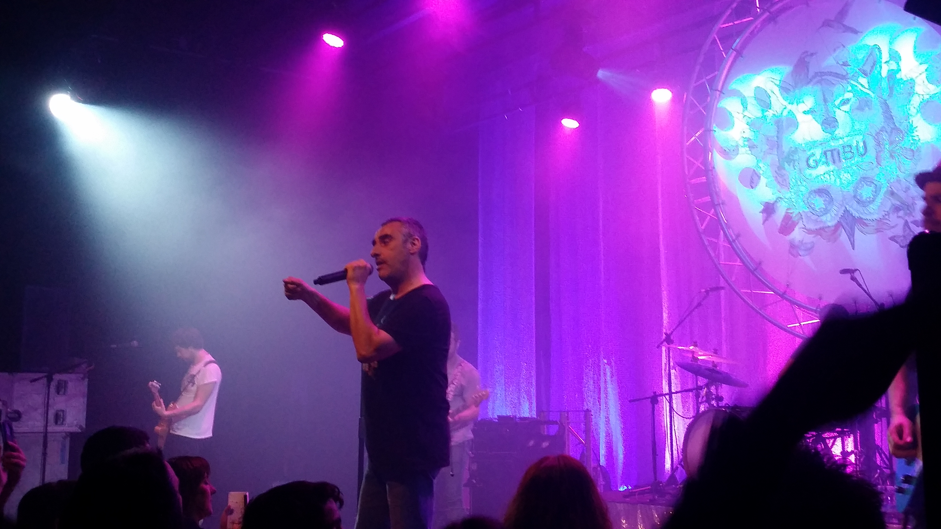 Gatiburen kontzertua Intxaurrondoko Kultur Etxean, 2017